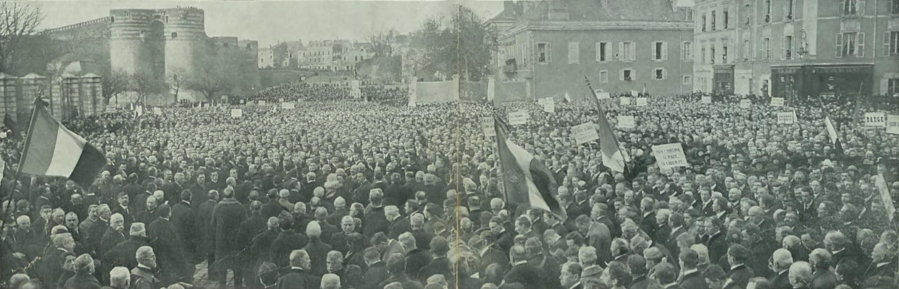 Manifestation de la Fédération nationale catholique, le 8 mars 1925 sur la place Saint-Laud d'Angers, publié dans l'Illustration du 14 mars 1925